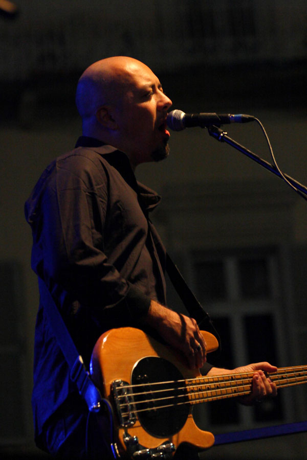 Acqui Terme